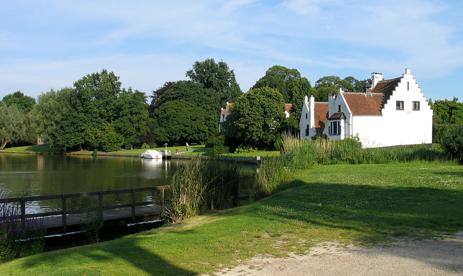 Leiebocht in Sint-Martens-Latem, te zien op schilderijen van schilders van de Latemse school